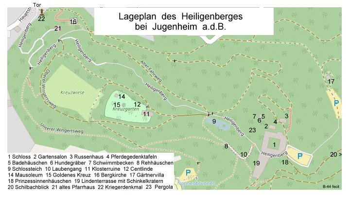 Lageplan des Kulturdenkmals Heiligenberg bei Jugenheim an der Bergstraße, Gemeinde Seeh.-Jugenheim.